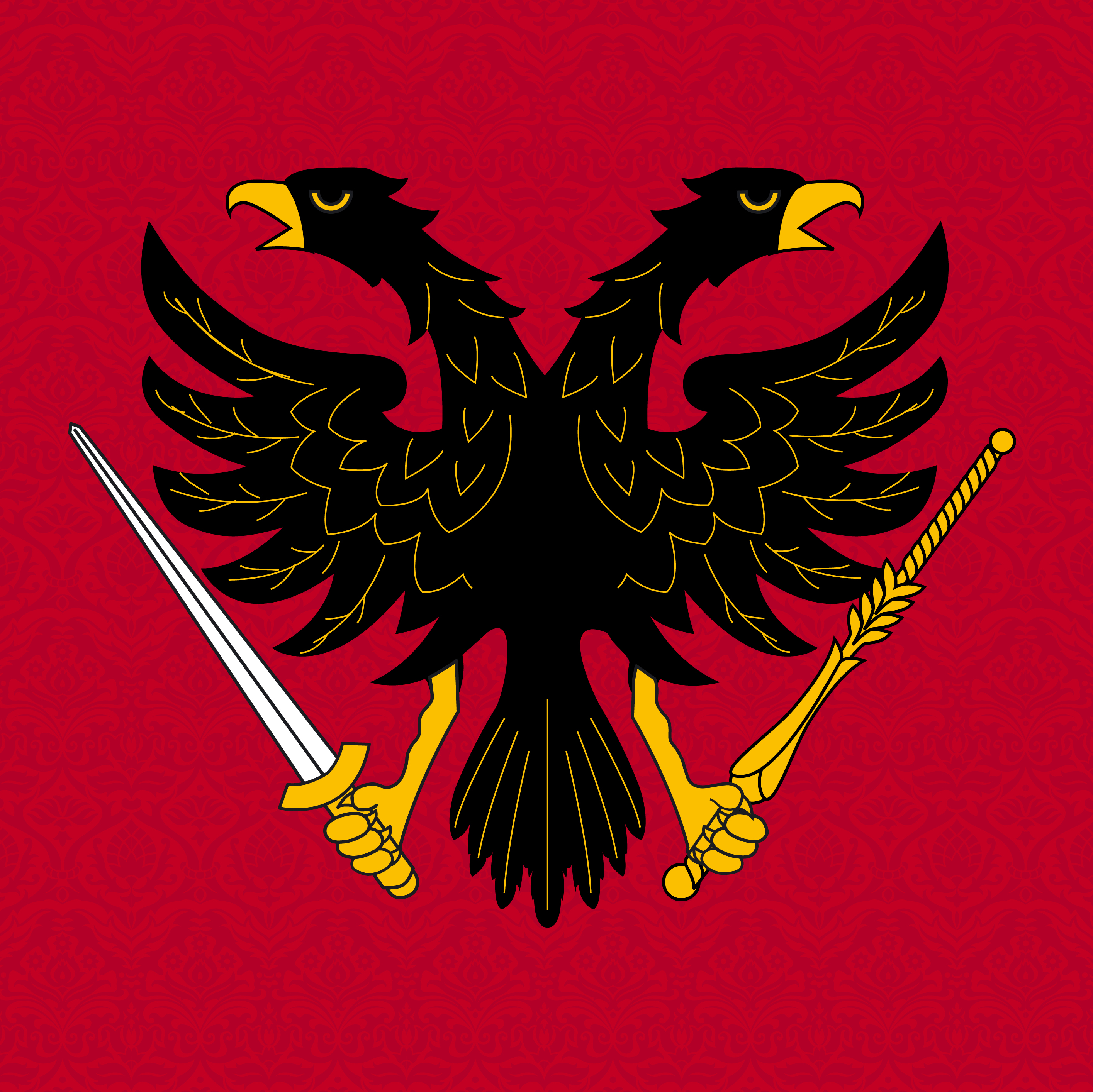 Wappen der Gemeinde Simplon